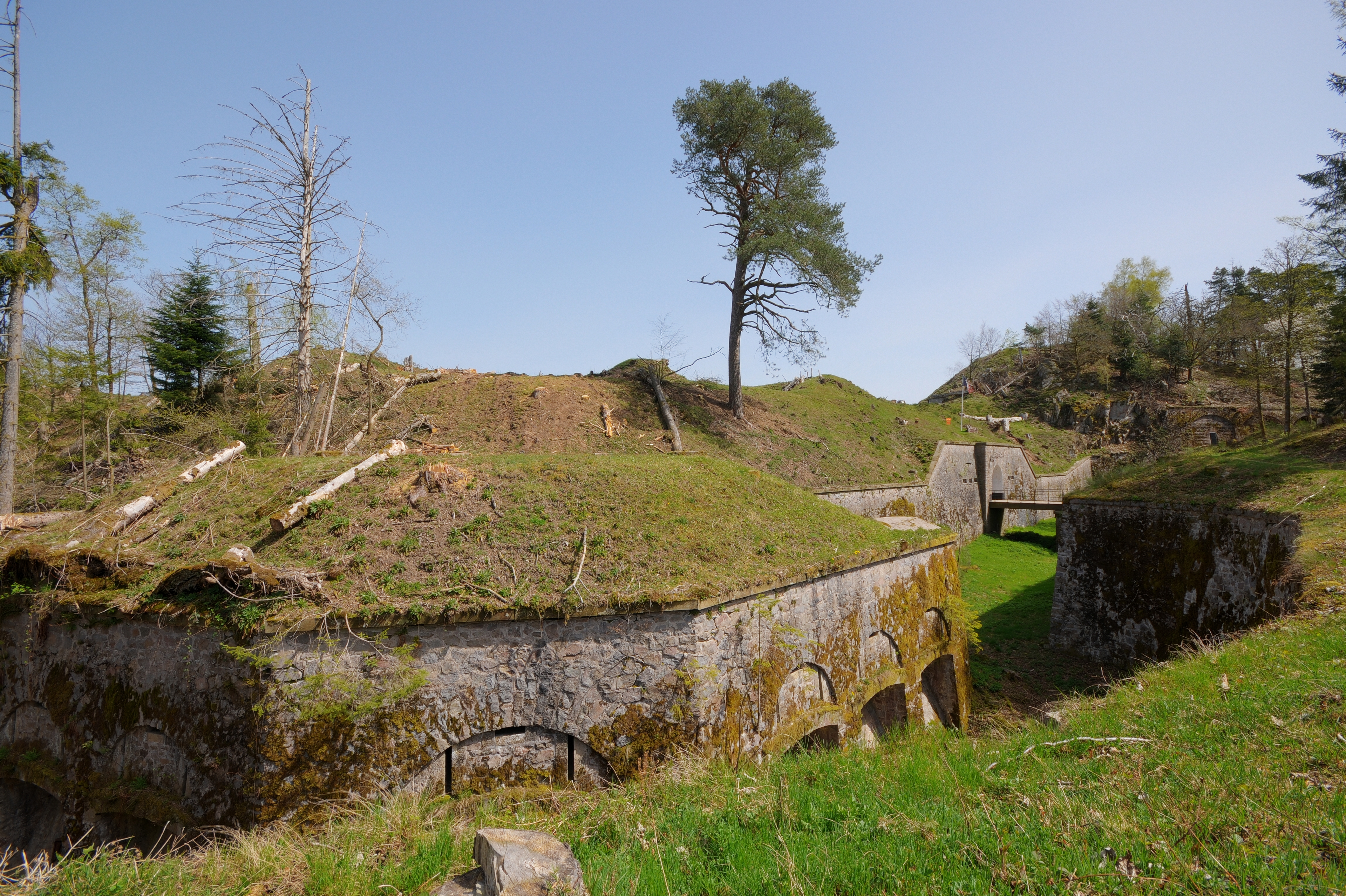 This photograph was taken with a Nikon D300 Vue sur la caponnière double ainsi que sur l'entrée. Parmont hill fortifications (HDR).